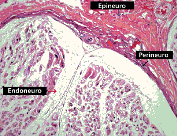 Nervio periférico, sección transversal. HyE. Epineuro en color rojo (arriba). Se observan los vasa vasorum con globulos rojos en su interior (arriba derecha). Fascículos nerviosos en blanco (abajo).